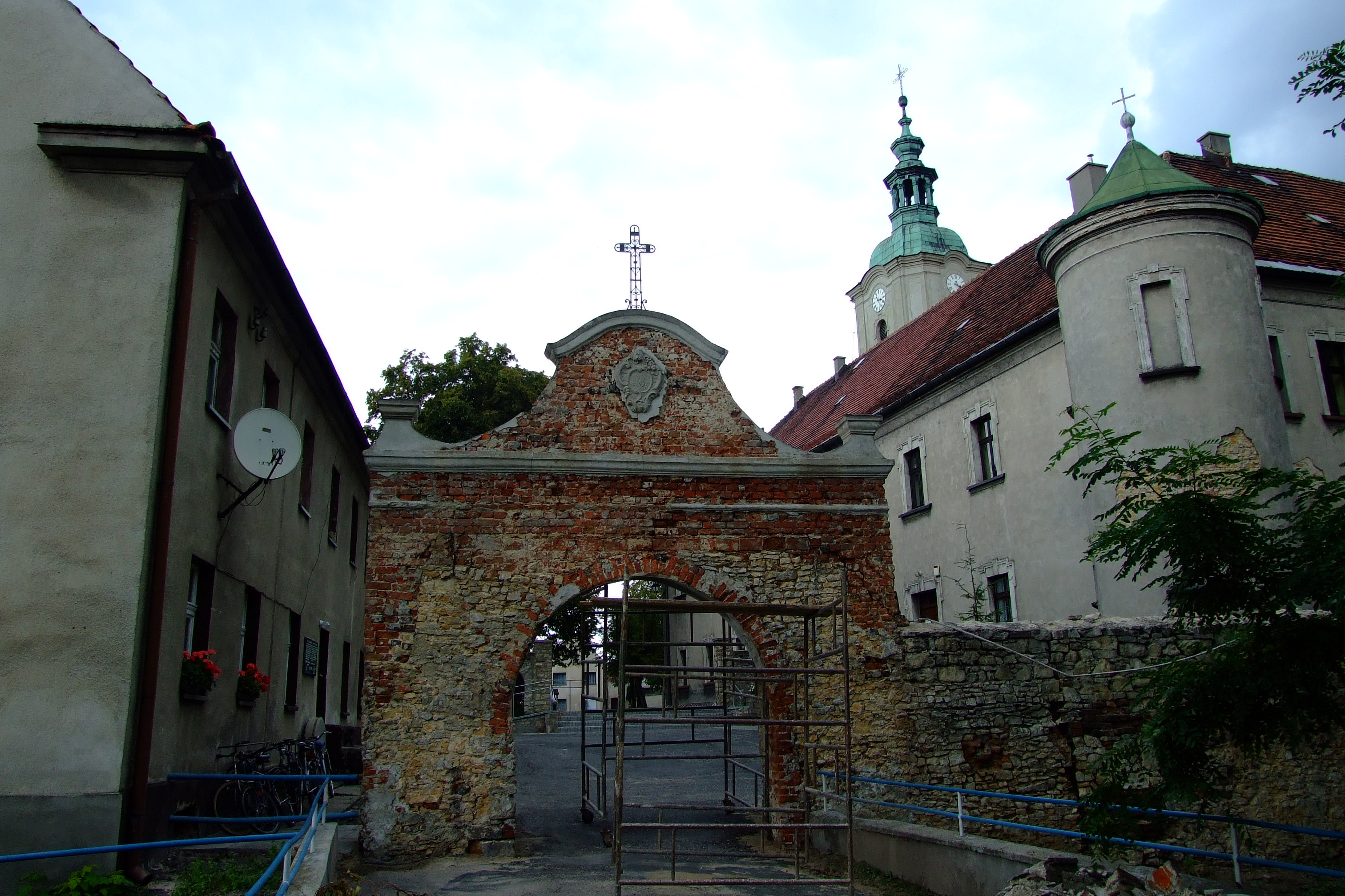 Dawne wejście do klasztoru Cystersów w Jemielnicy